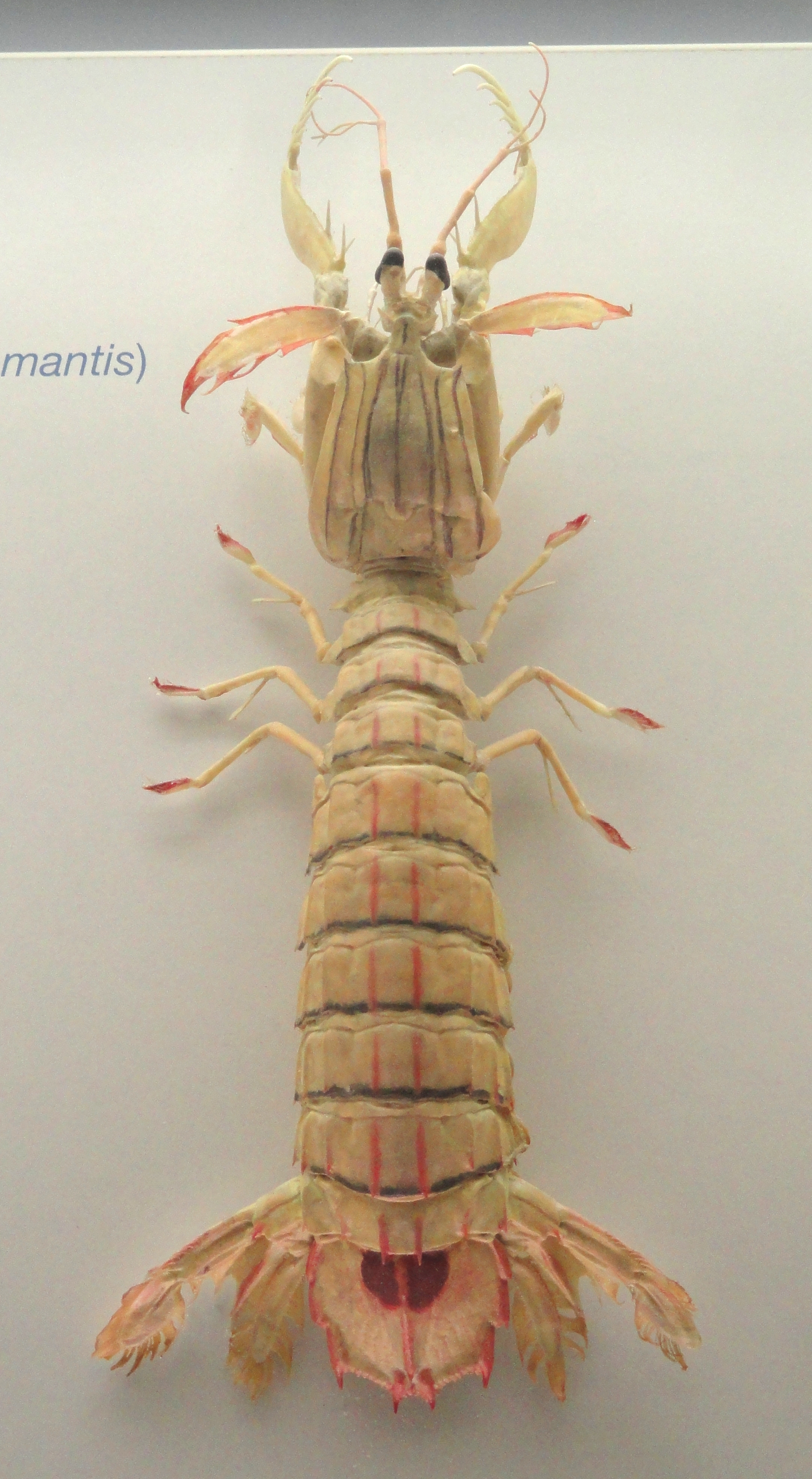 Exhibit in Naturmuseum Senckenberg, Frankfurt am Main, Germany.